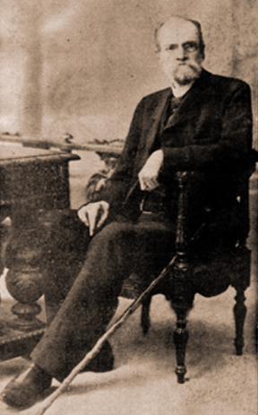 Diego Jacinto Agustín Barros Arana (* 16 de agosto de 1830, Santiago - † 4 de noviembre de 1907, Santiago) pedagogo, diplomático e historiador chileno. Es considerado un gran historiador chileno del siglo XIX